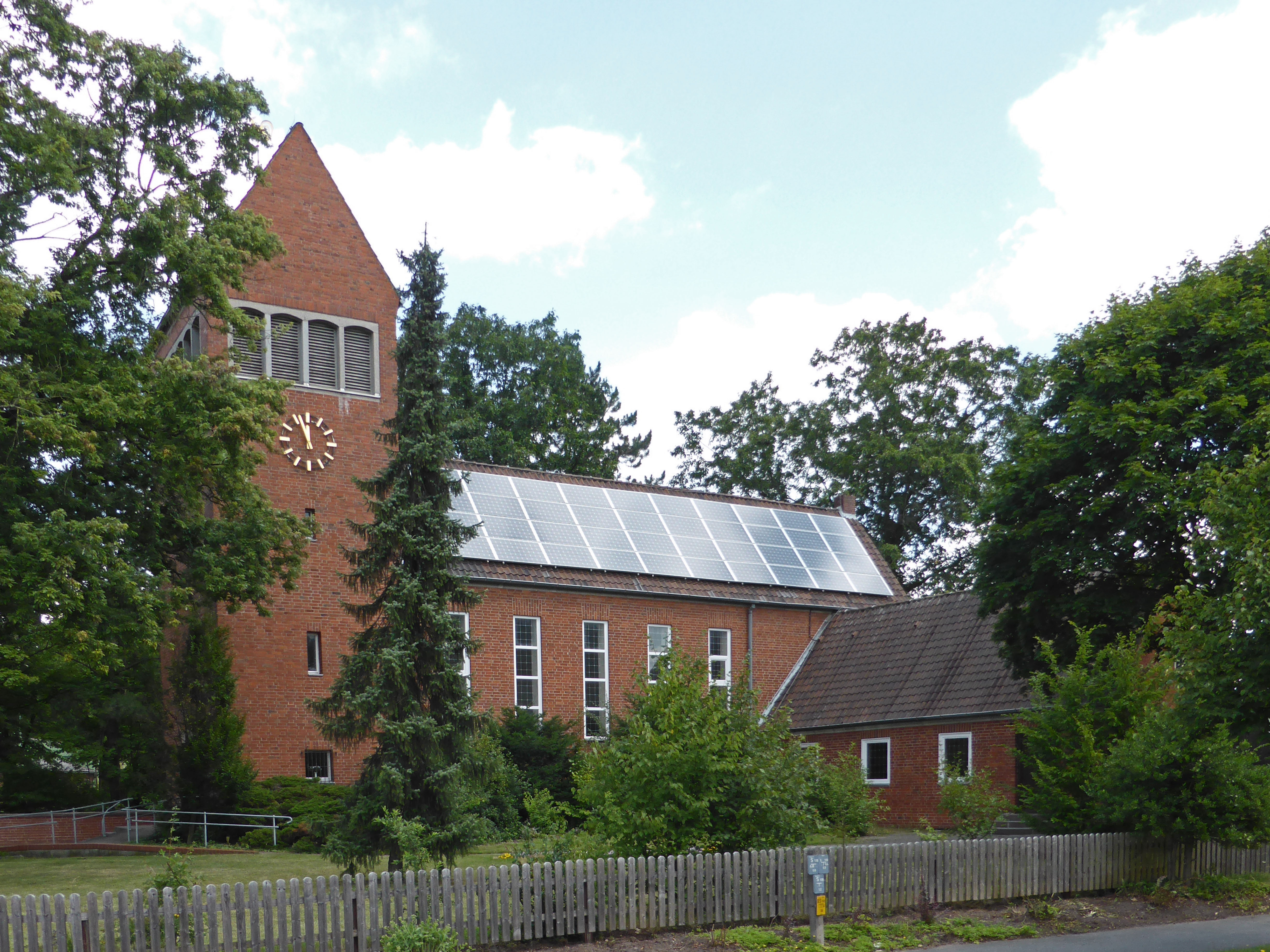 Evangelisch-lutherische St. Johanniskirche in Wesendorf.